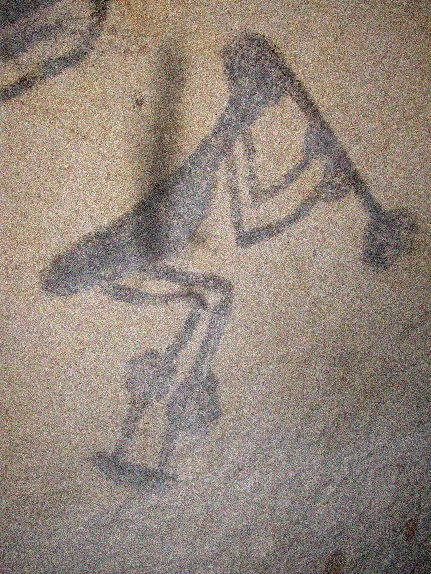 Pictografía behique haciendo cohoba, Cueva No. 2, El Pomier.